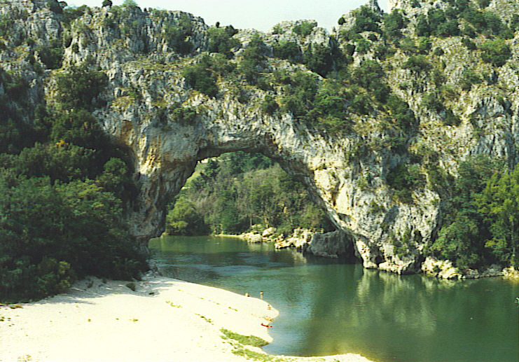 zelf gemaakt